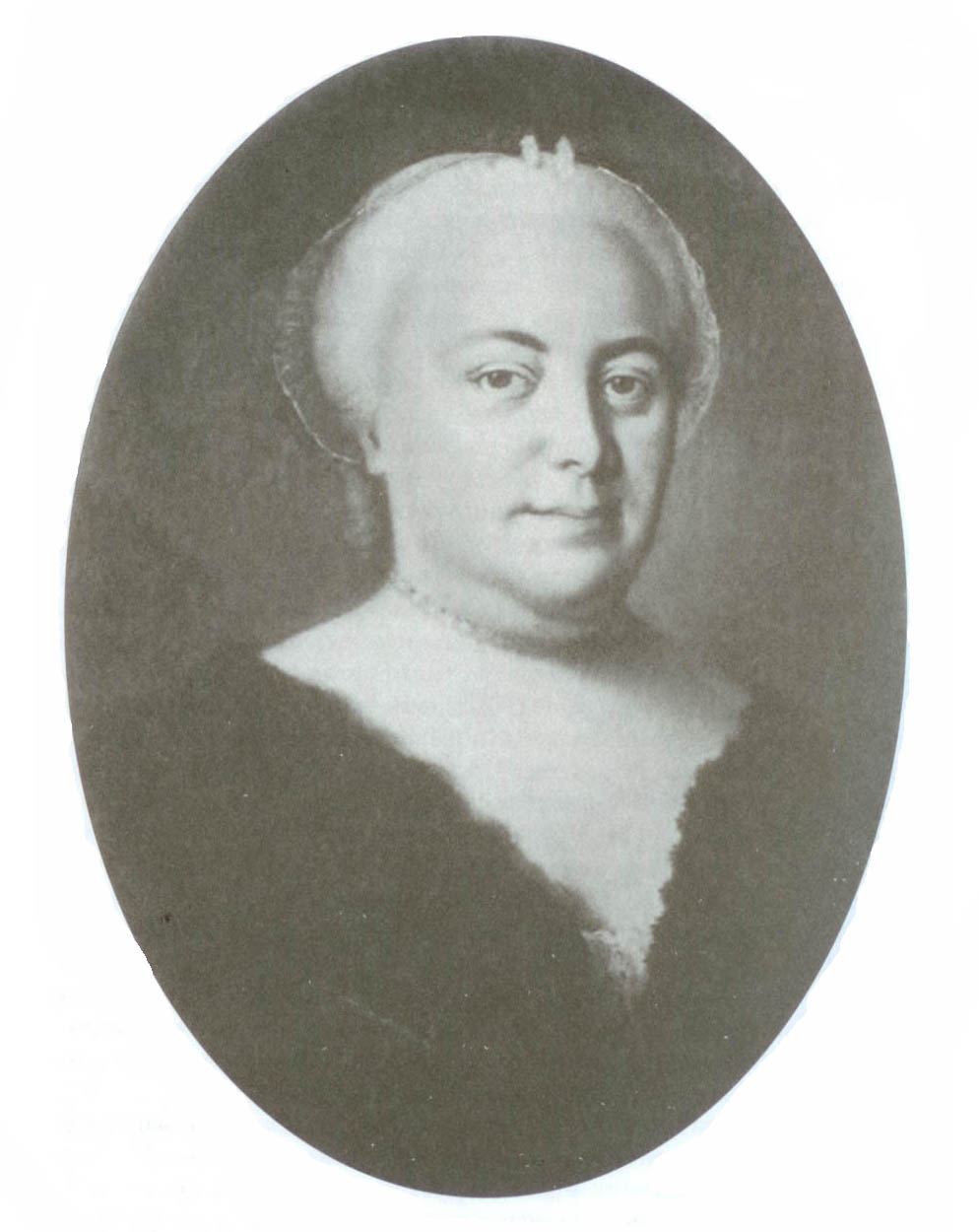 Наталья Григорьевна Белосельская (1711-1760), дочь графа Г.П.Чернышева и Е.И.Ржевской; вторая жена вице-канцлера М.А.Белосельского, мать дипломата А.М.Белосельского.